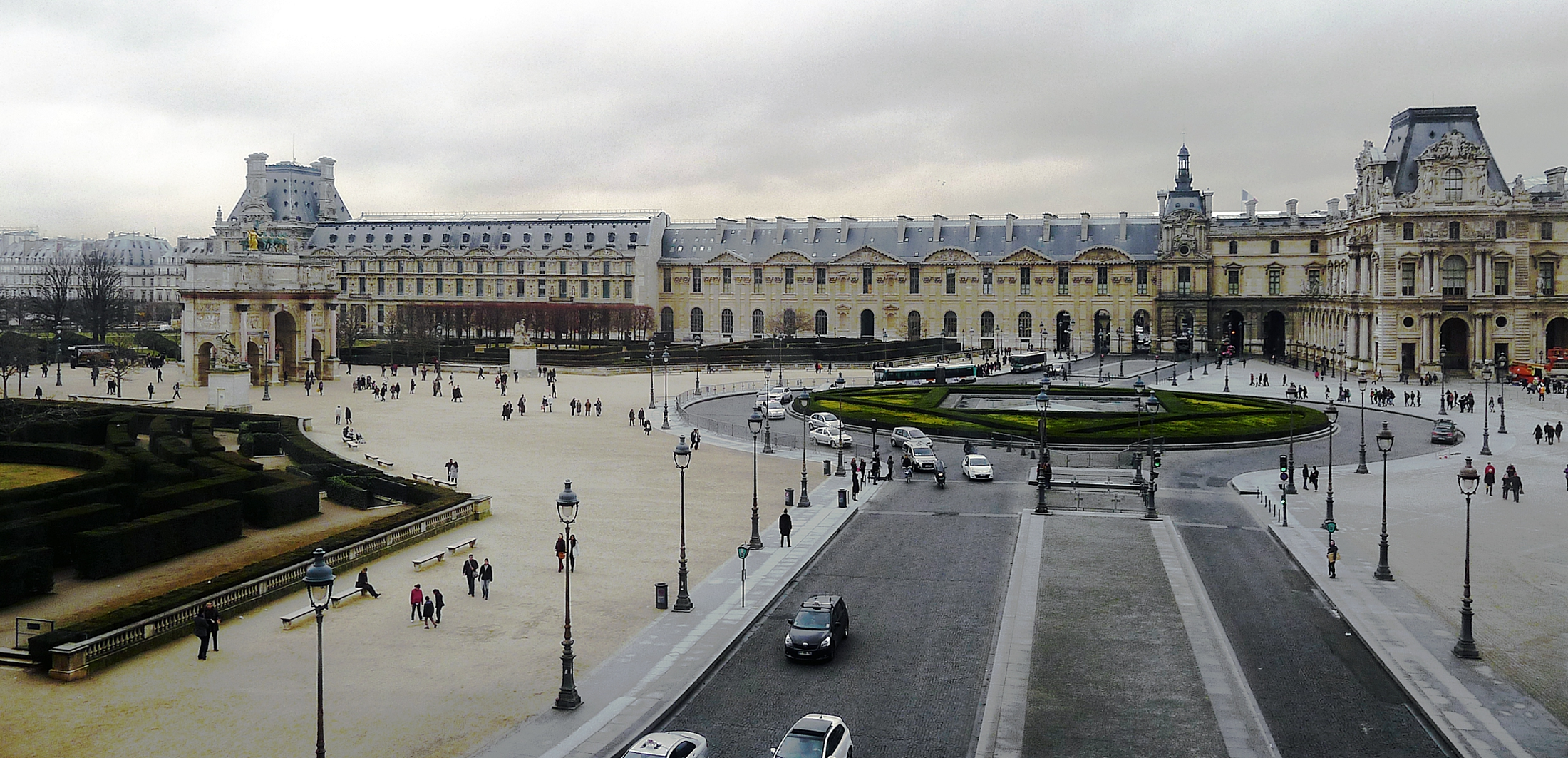 Place du Carrousel - Paris Ier